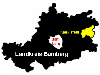 Lage von Königsfeld im Landkreis Bamberg in Oberfranken